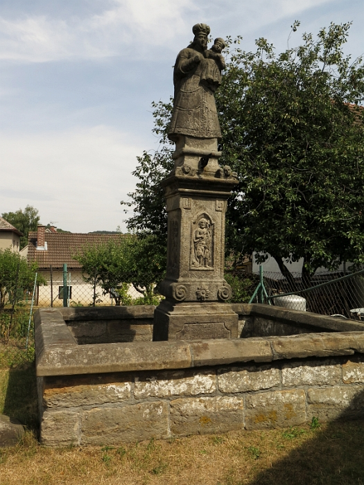 Socha Panny Marie Bozkovské, při škole, Olešnice (okres Semily).